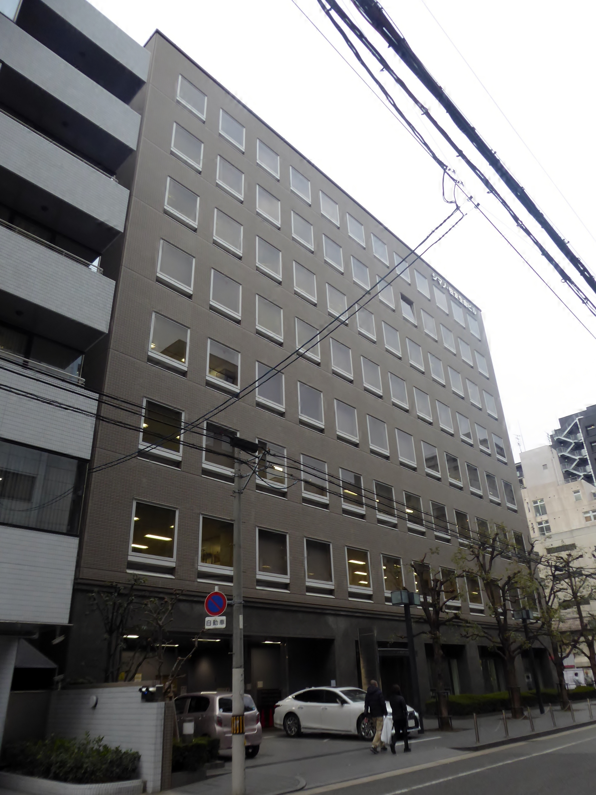 シマノ・住友生命ビルを撮影。